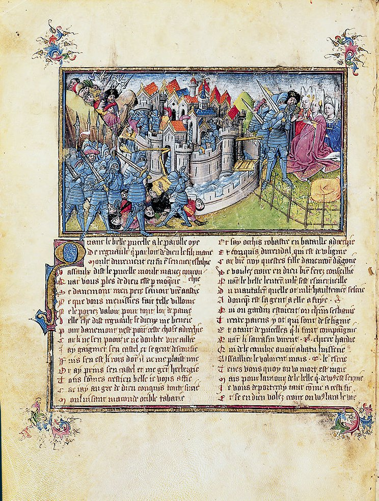 Chanson de Renaut de Montauban ou les Quatre Fils Aymon, manuscrit provenant de Flandre